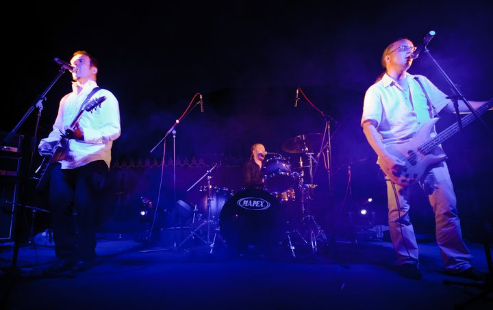 Концерт N.R.M. в городе Горки, 11 июня 2011 года. Пит Павлов, Олег Демидович, Юрась Левков